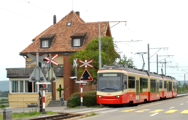 Forchbahn Be 4/6 op 26 mei 2007 aan de Alten Forchstrasse te Küsnacht